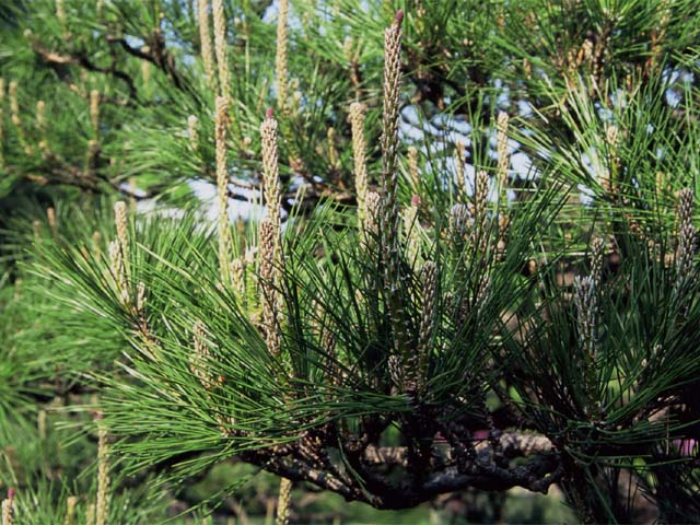 Pinus densiflora, pino cororado en japon. Foto por usario Inti-sol en Parque Rikugien de Tokyo, mayo de 2006. アカマツ 2006年5月、東京・六義園にて投稿者が撮影